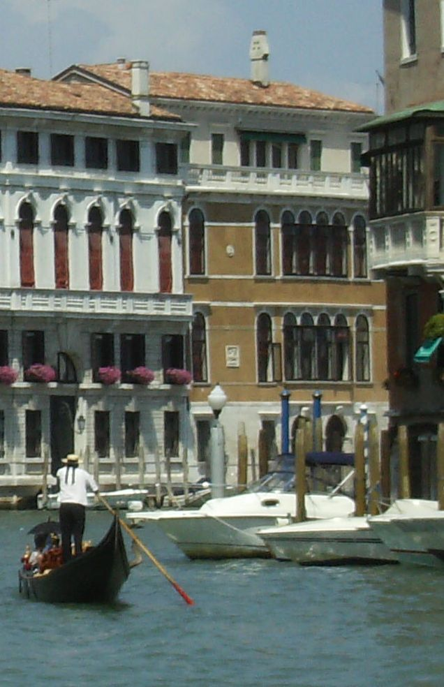 Venise - palazzo Dandolo Paolucci